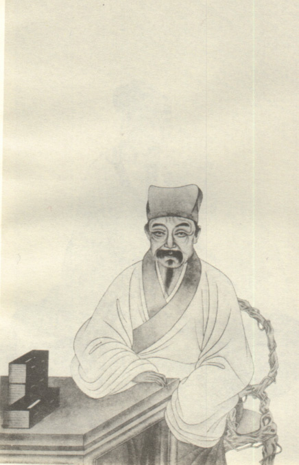 陆世仪，清朝学者。Lu Shiyi